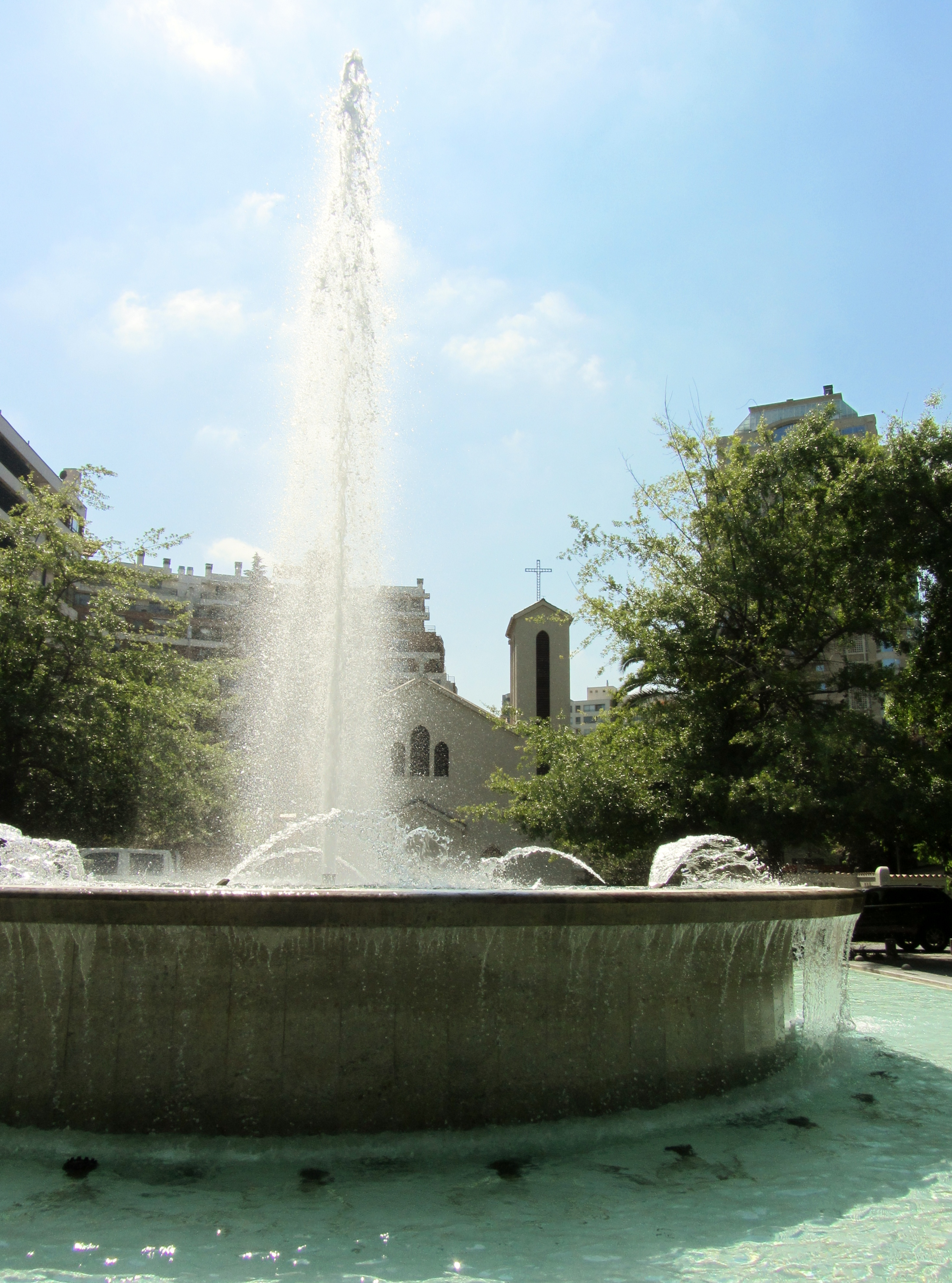 La fuente de la Plaza Loreto, avenida El Golf, mirando a la Iglesia de Nuestra Señora de los Ángeles.